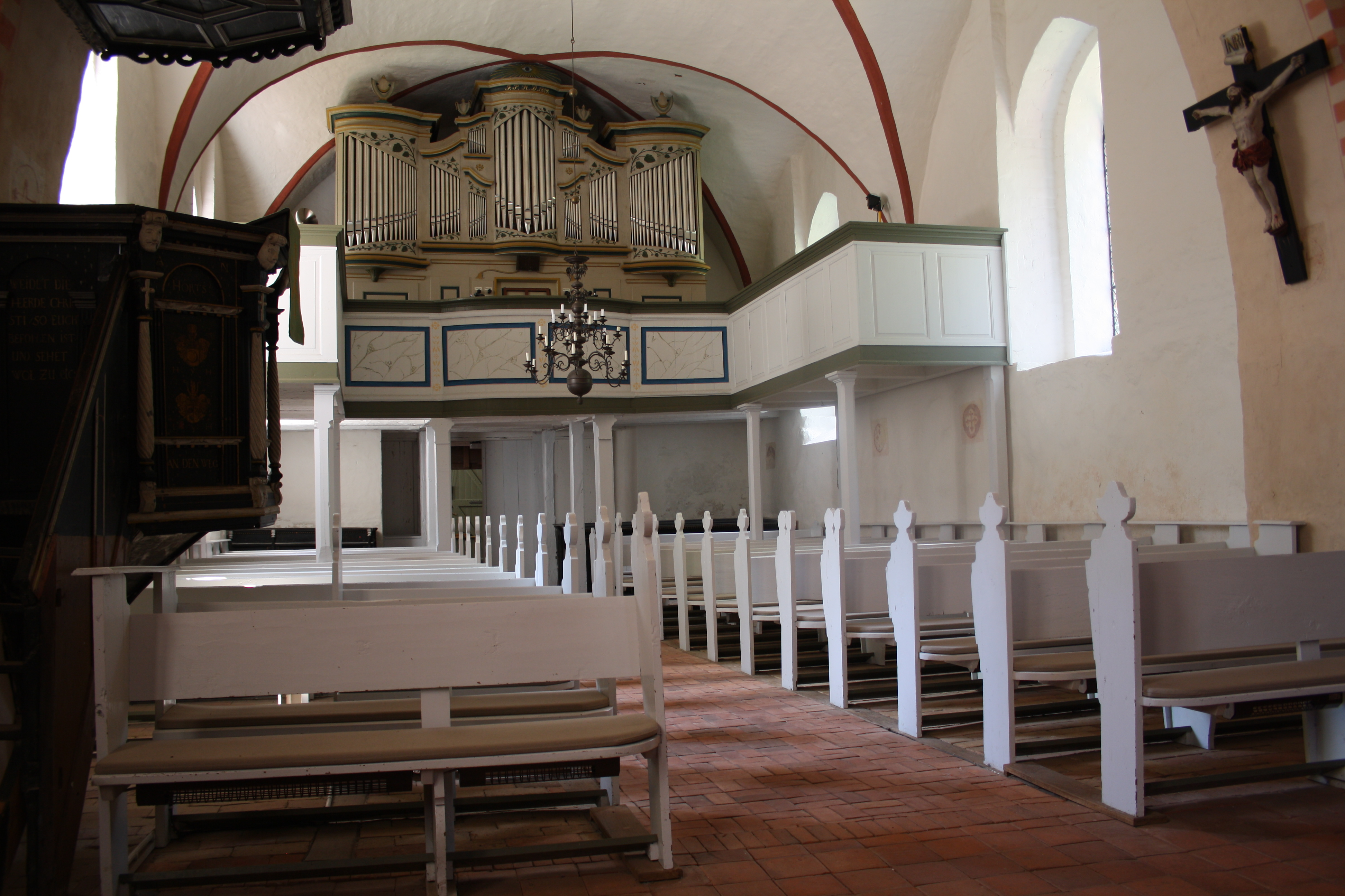 Friese Orgel in der Zittower Dorfkirche sowie Orgelempore